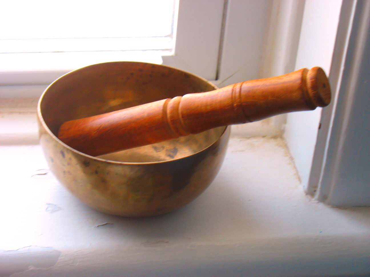 Klangschale / Singing bowl. Bought in Heidelberg.